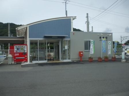 幸崎駅駅舎